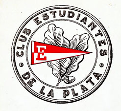 Insignia institucional del Club Estudiantes de La Plata, establecida oficialmente en 1934.